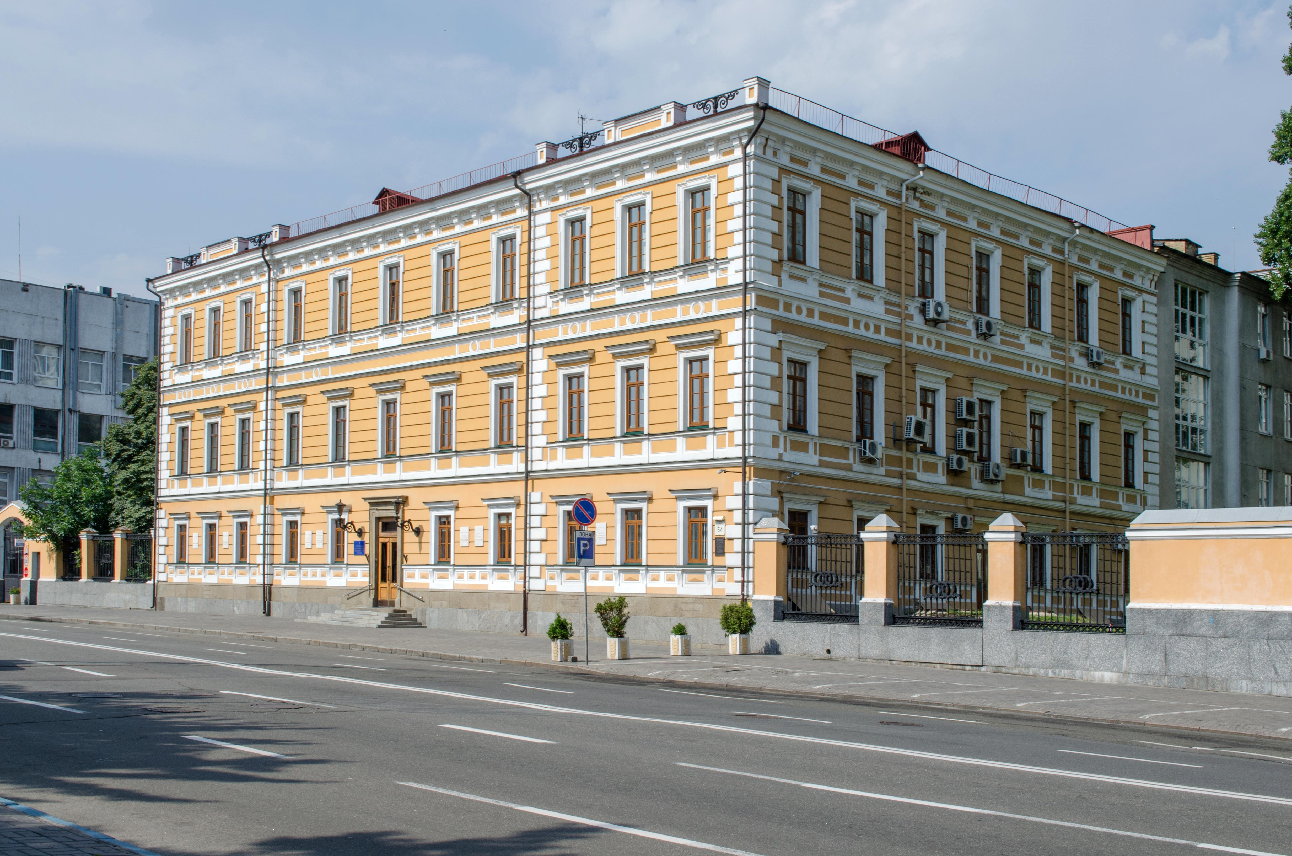 Здание Президиума НАН Украины в Киеве.